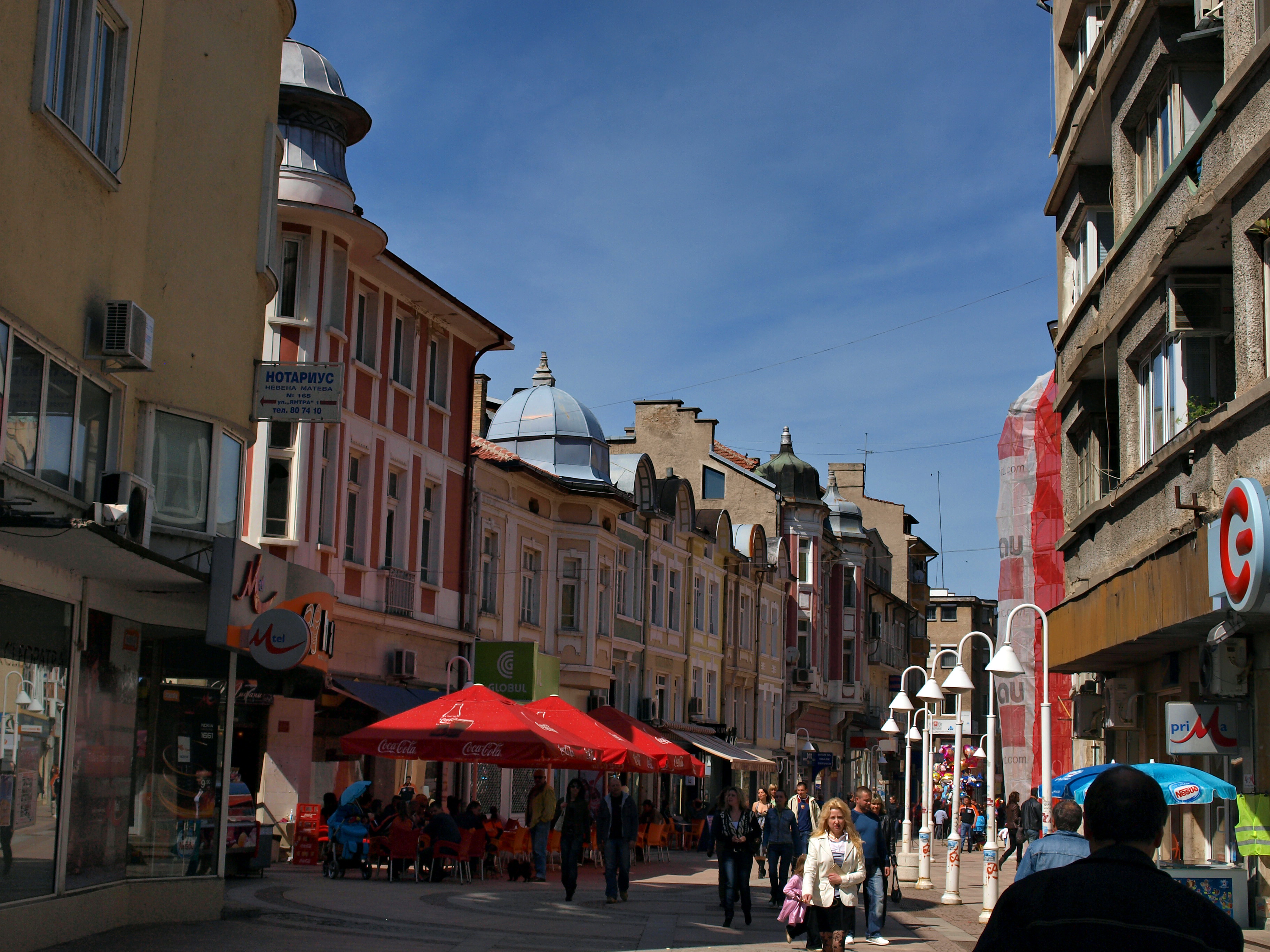 Street scene in Gabrovo